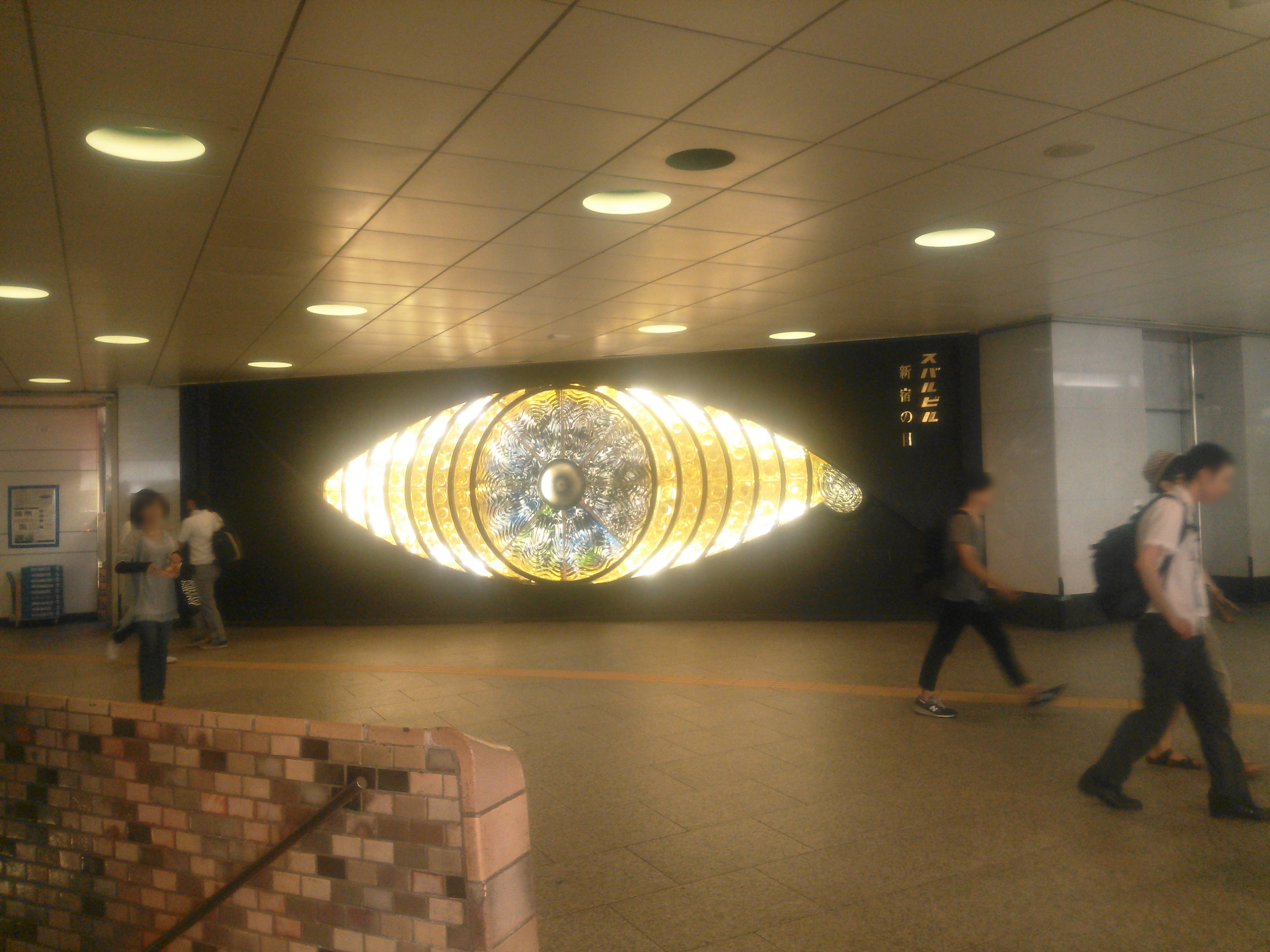 新宿スバルビル地下の「新宿の目」